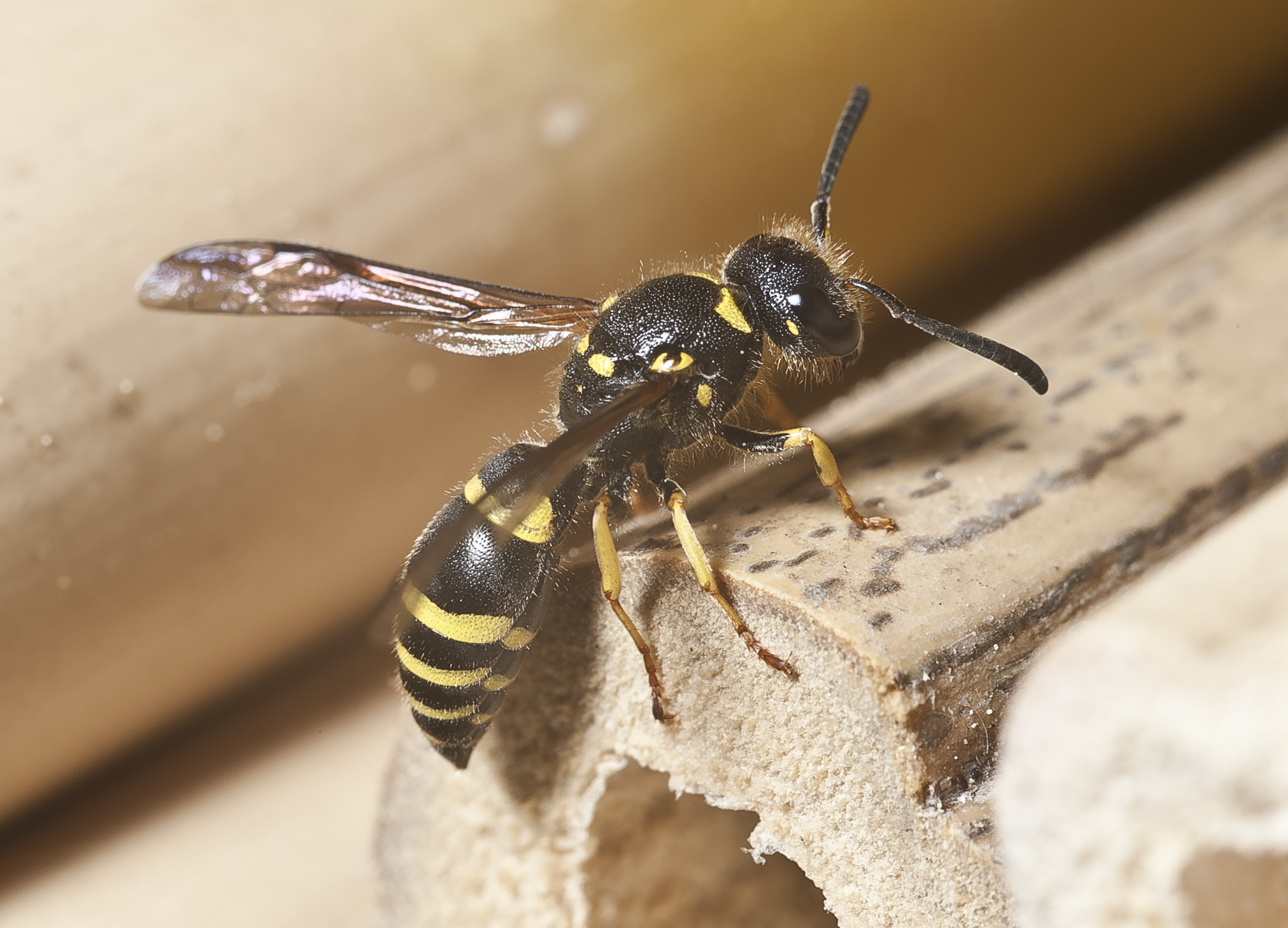 Ancistrocerus nigricornis, aufgenommen in Stuttgart